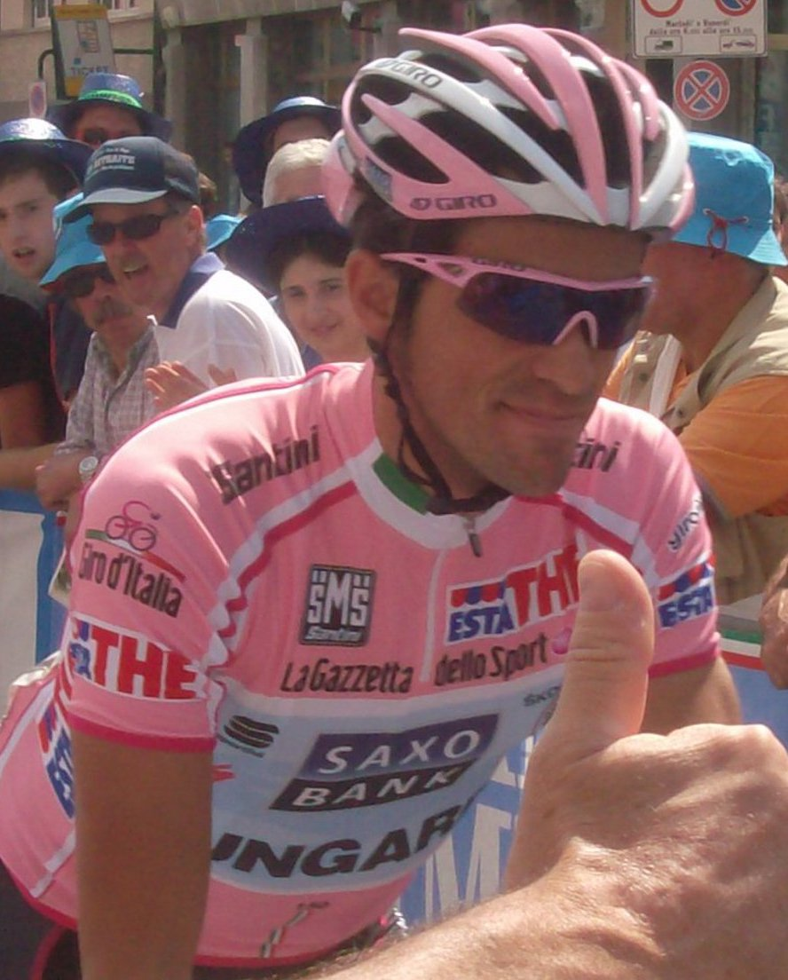 foto in primo piano